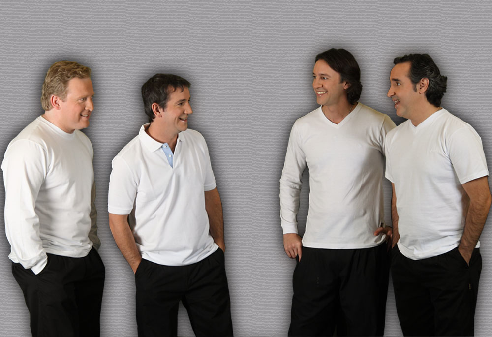 Los Alonsitos